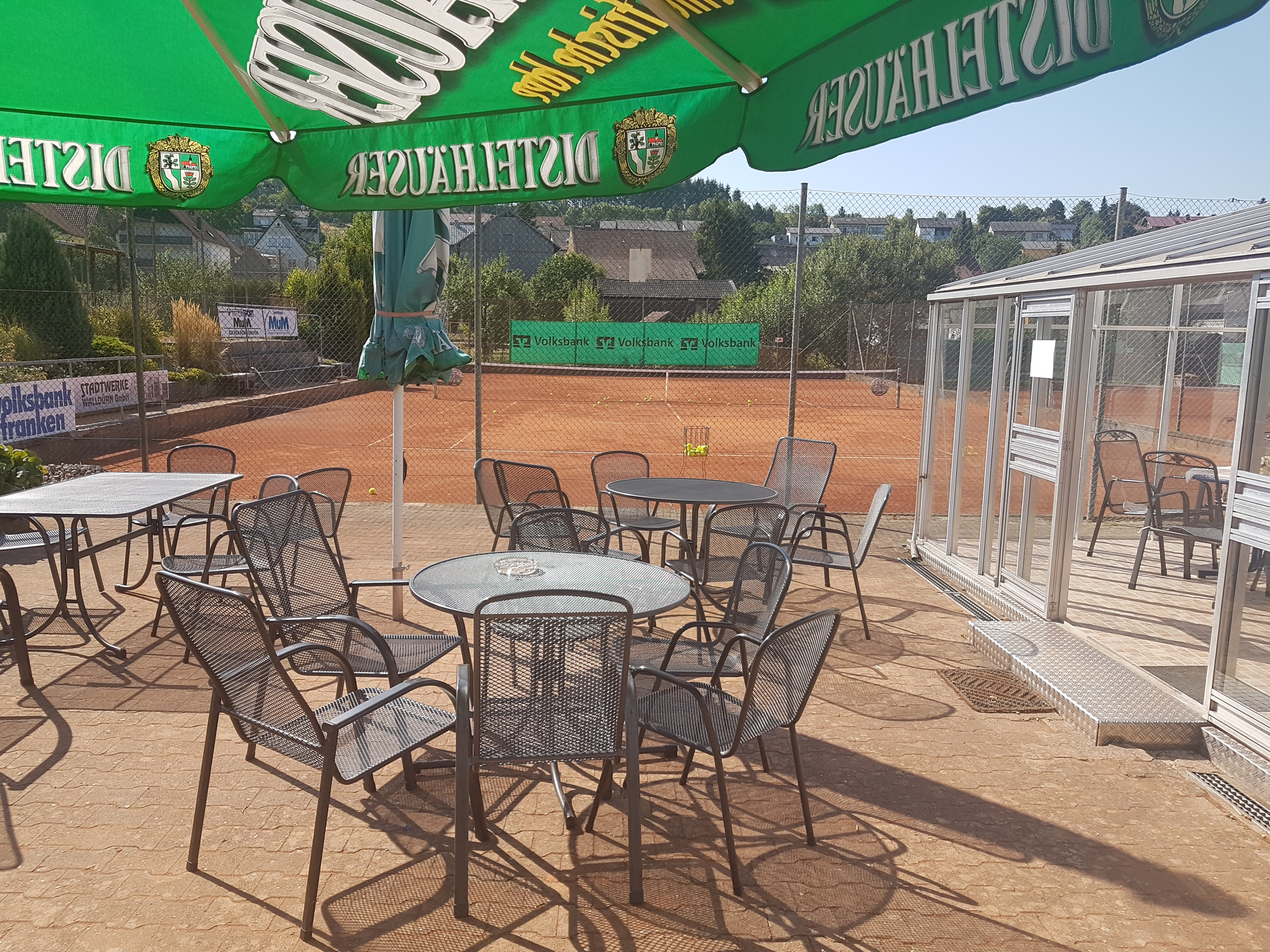 Tennisanlage